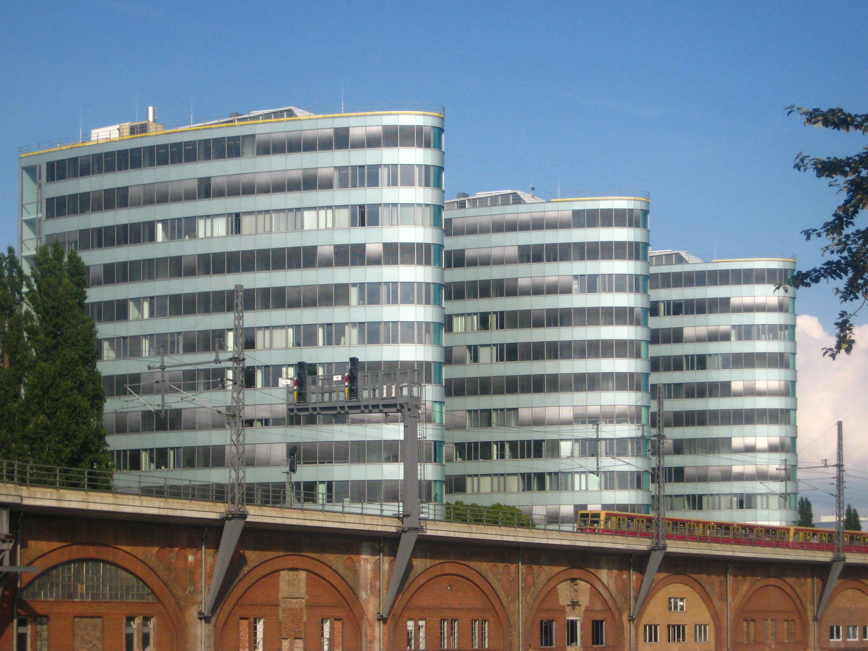 Der Bürokomplex Trias an der Holzmarktstraße 15-18 in Berlin-Mitte, hier gesehen vom jenseitigen Spree-Ufer am c-base. Die drei Bürotürme wurden 1992-1996 nach einem Entwurf der Architekten Lucia Beringer und Gunther Wawrik errichtet. Seit 2008 sind sie Hauptsitz der Verwaltung der Berliner Verkehrsbetriebe (BVG).